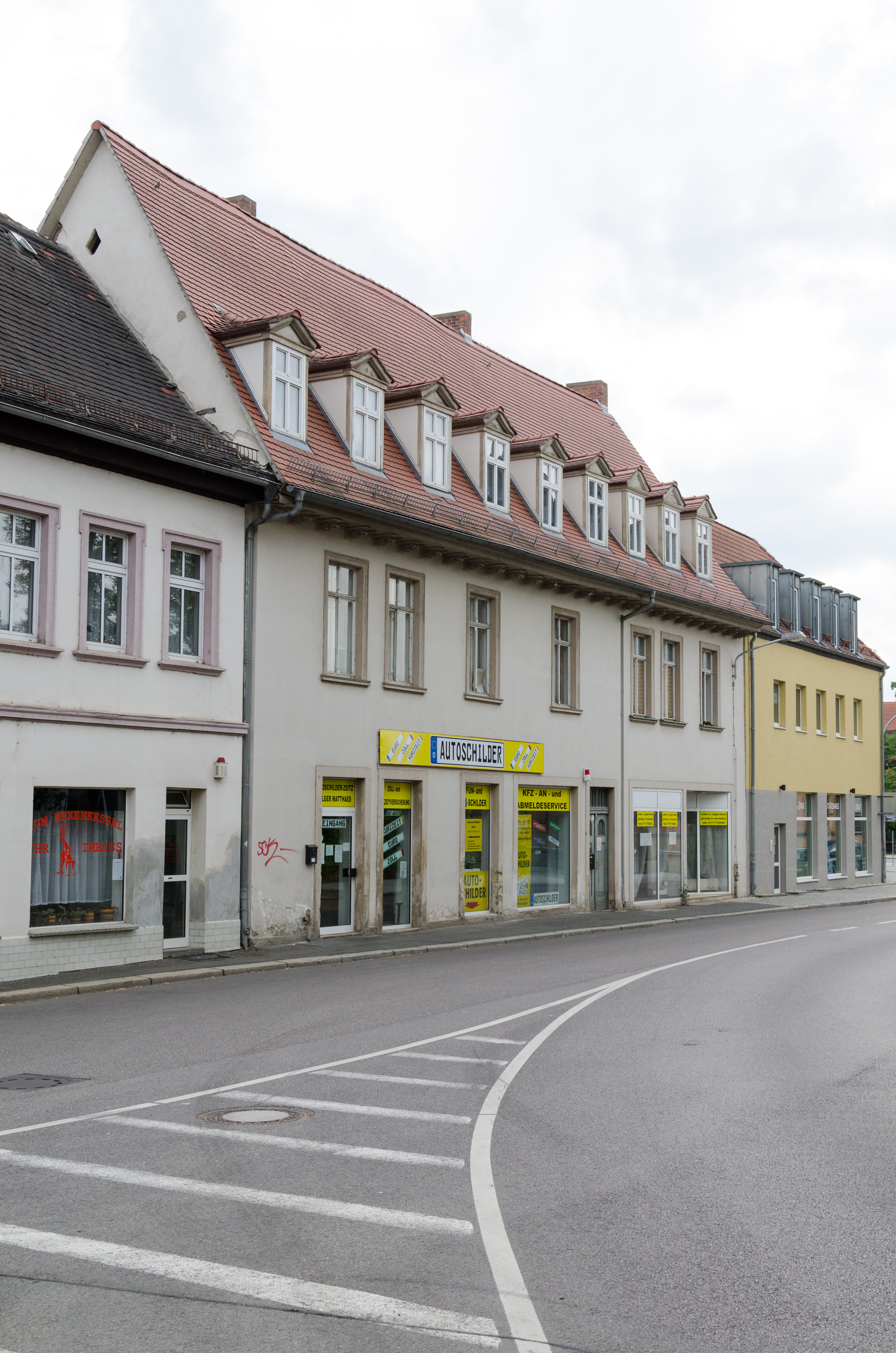 Zeitz, Domherrenstraße 7